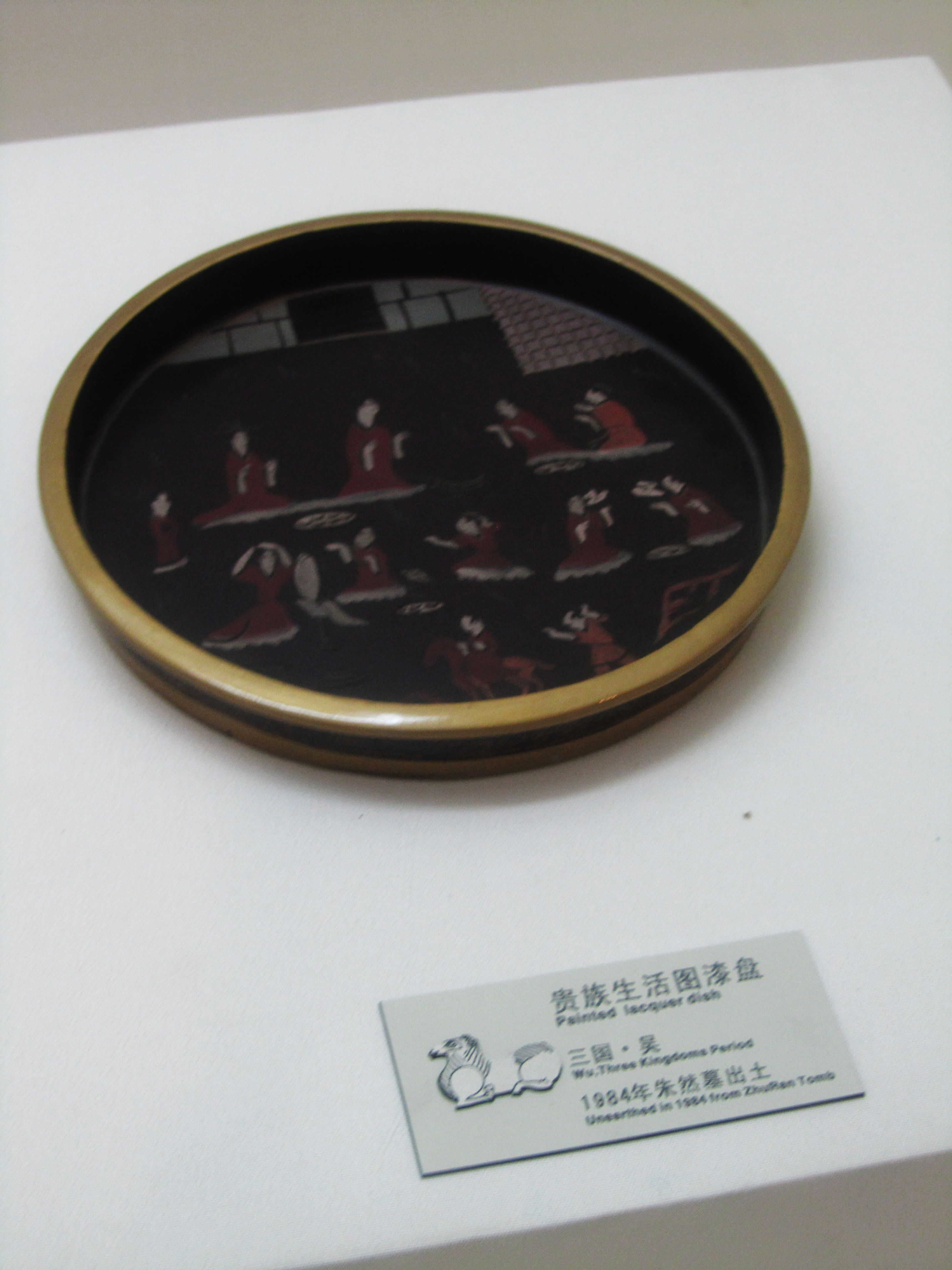 朱然家族墓地中出土的贵族生活图漆盘。